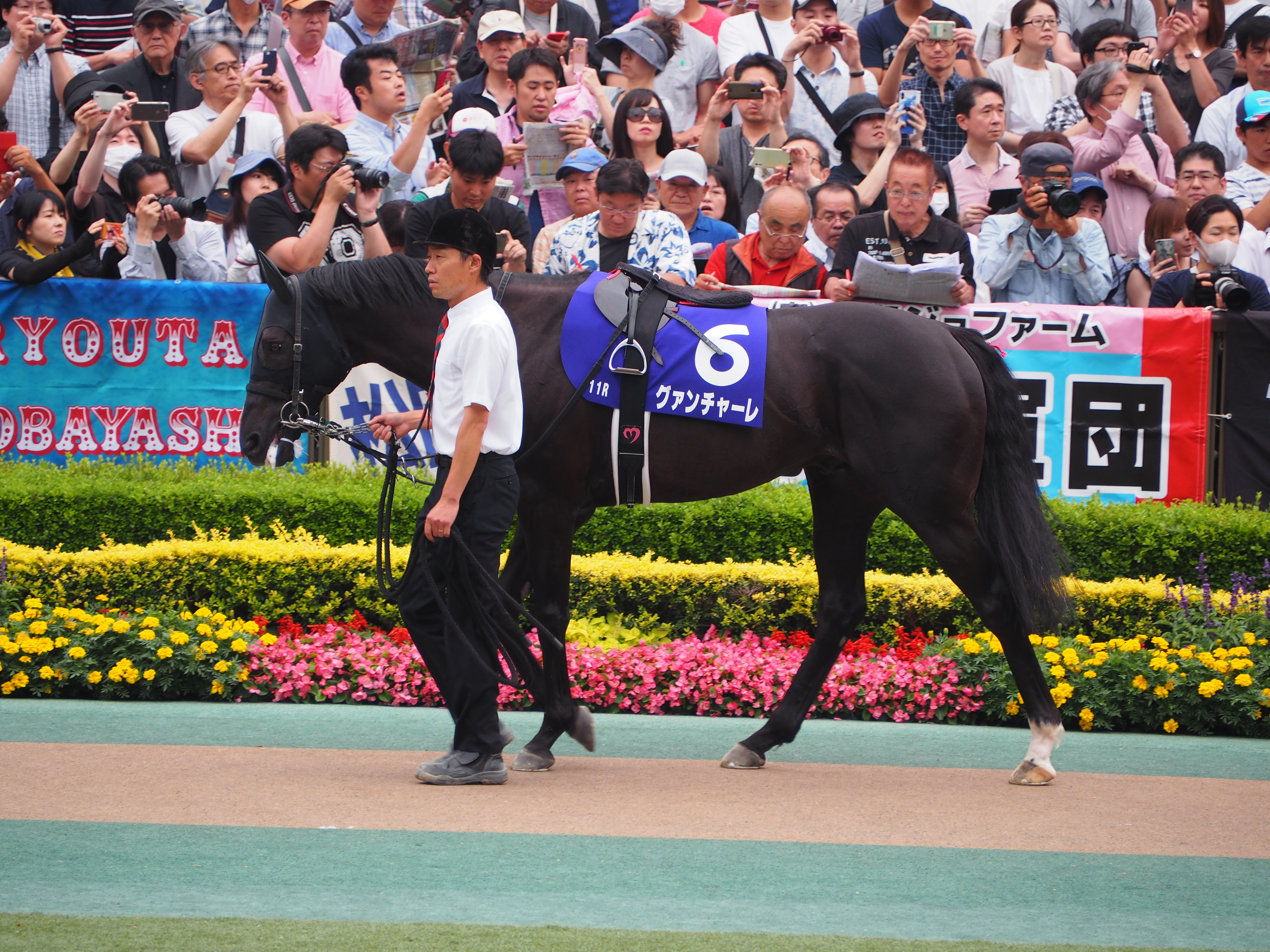 安田記念 パドック 2019